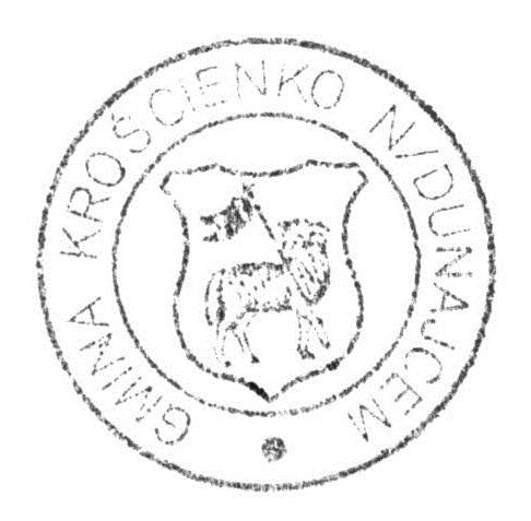 Urzędowa pieczęć Krościenka nad Dunajcem